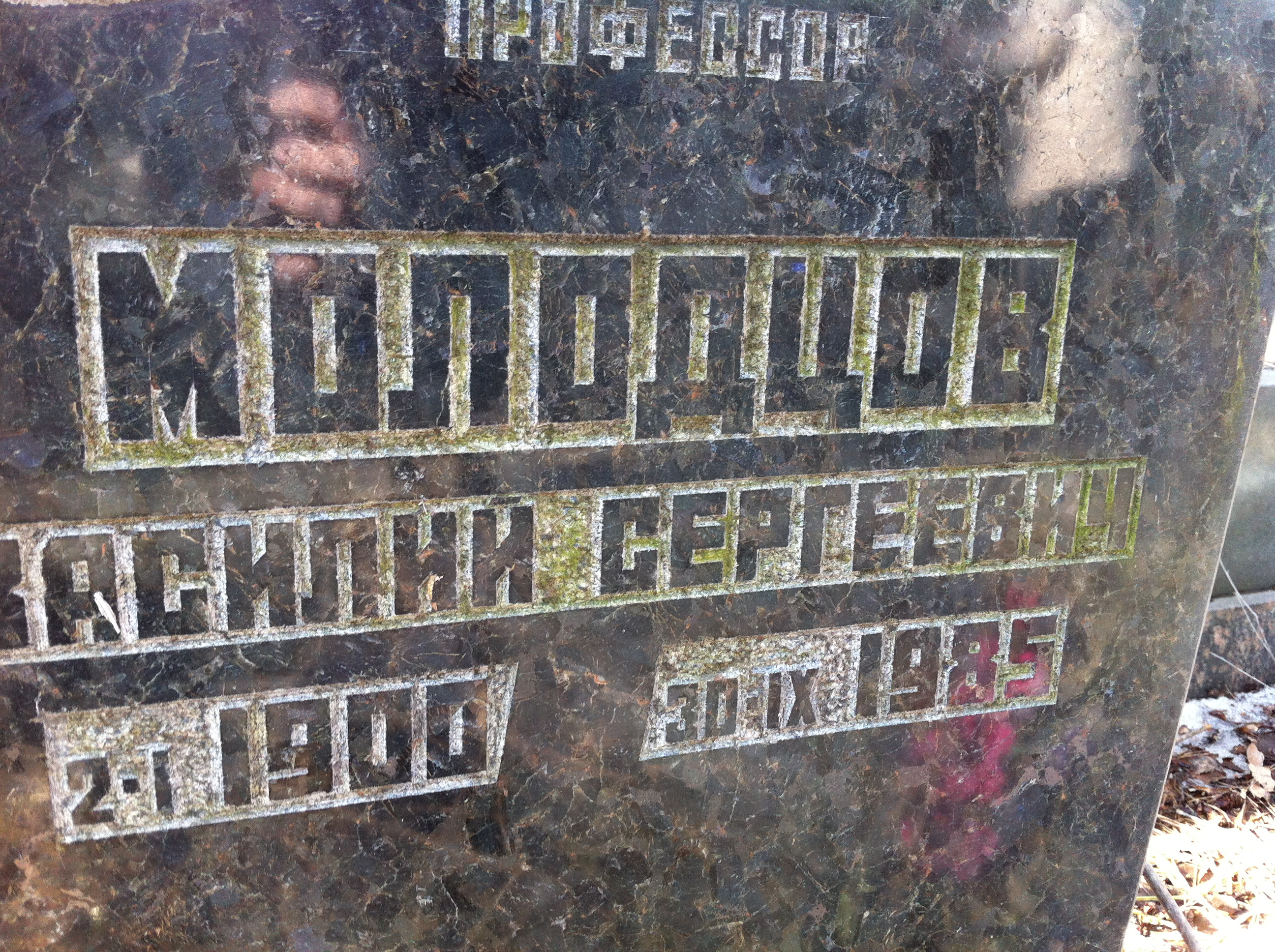 Памятник на могиле В. С. Молодцова. Родственники не верно перевели со старого стиля дату его рождения (с 18.02.1800 по 16.02.1900. + 12 дней)